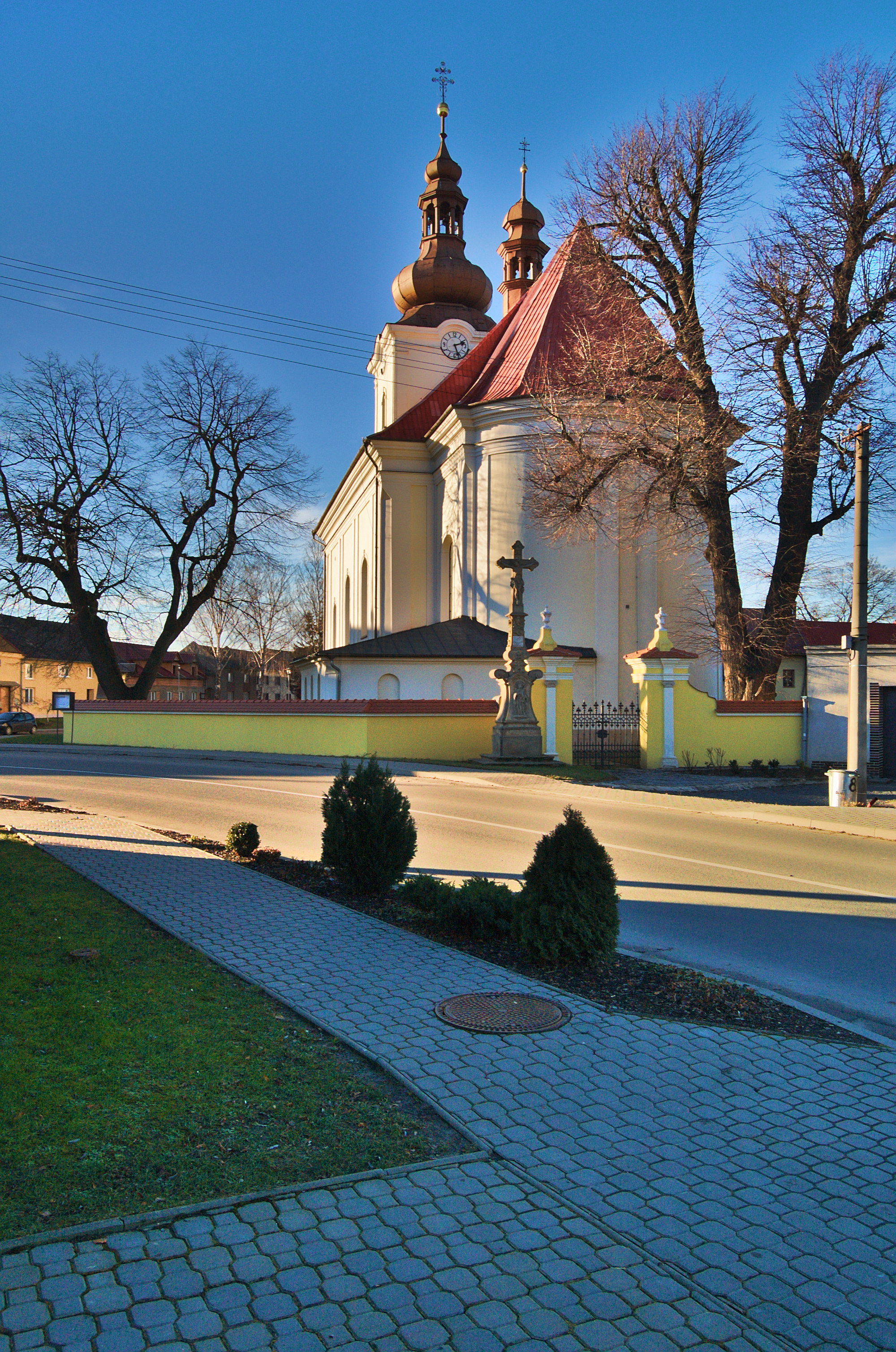 Kostel svatého Leonarda, Hněvotín, okres Olomouc